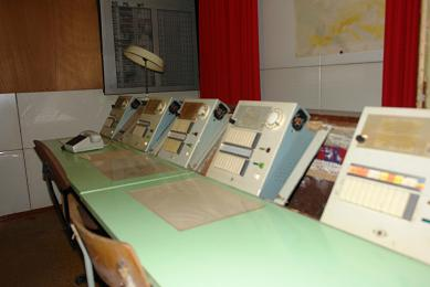 Bunker ZGS-14, Gefechtsabschnitt Diensthabender Nachrichten und Flugsicherung (DNF).